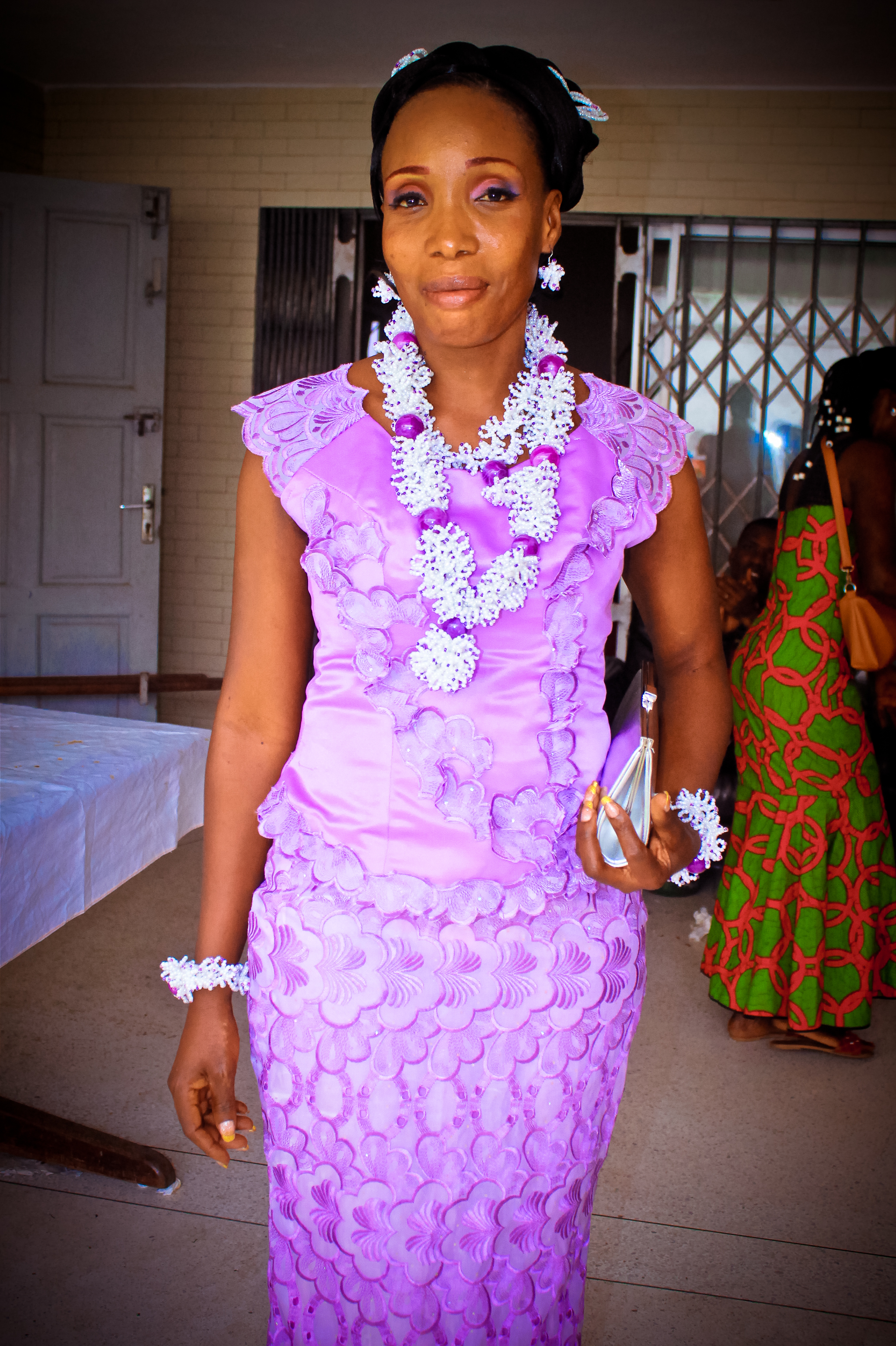 femme africaine habillée en parure et mode africaine pour sa ceremonie de dote